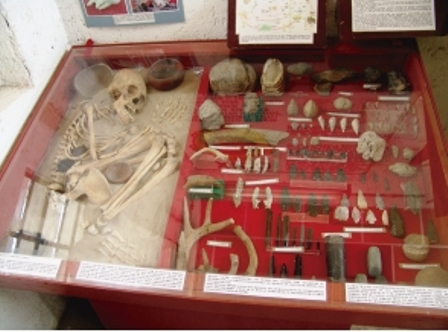 Piezas de entierro en el cerro del marqués de la época prehispanica